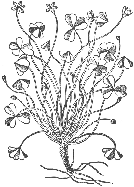 ""Oxalis"" (artiste inconnu)